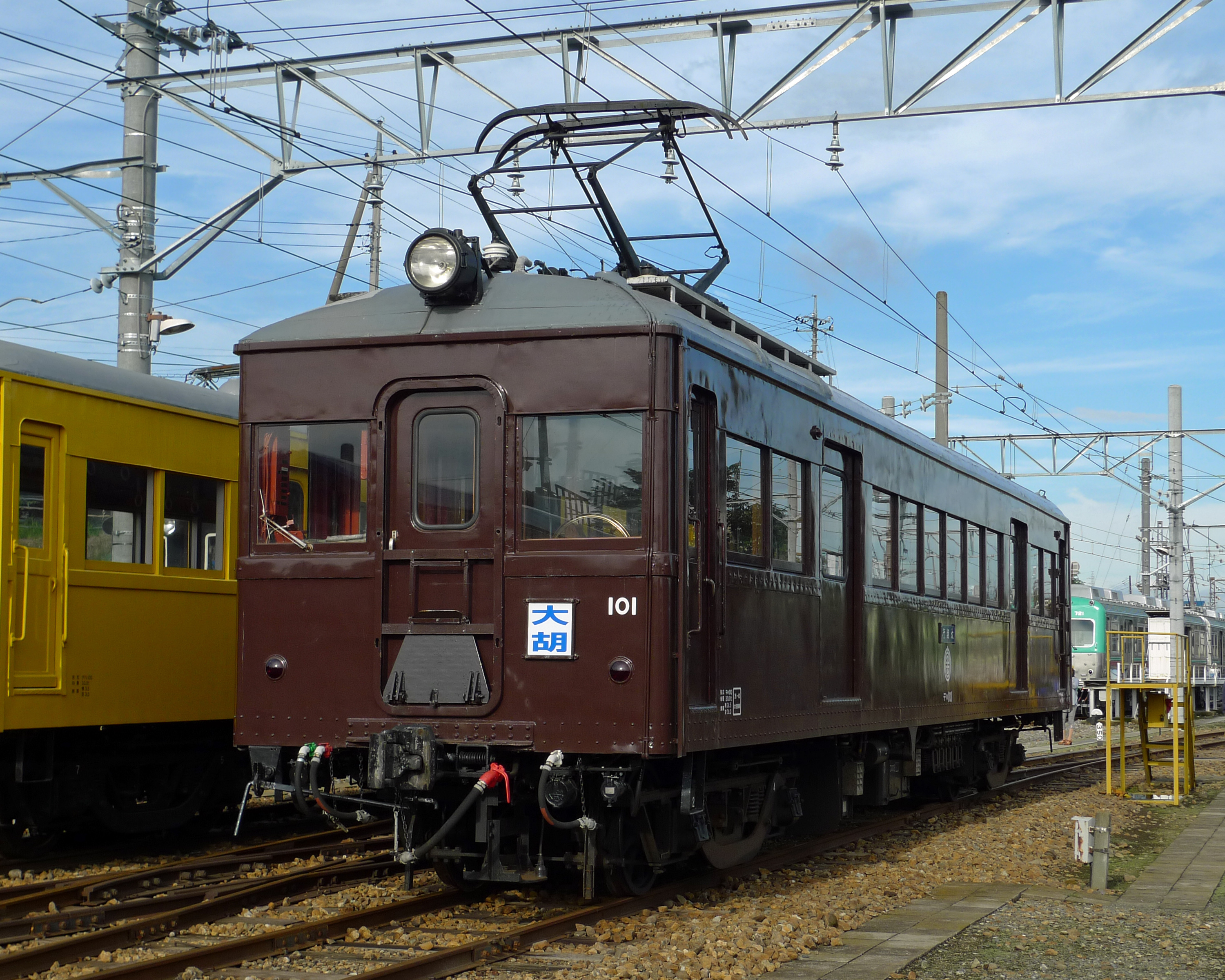 上毛電気鉄道デハ101貫通側 デハ101臨時運行後の大胡工場公開イベントにて撮影